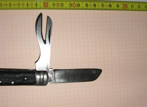 Coltello tattico Esercito Italiano (particolare lame) - Italian Army penknife